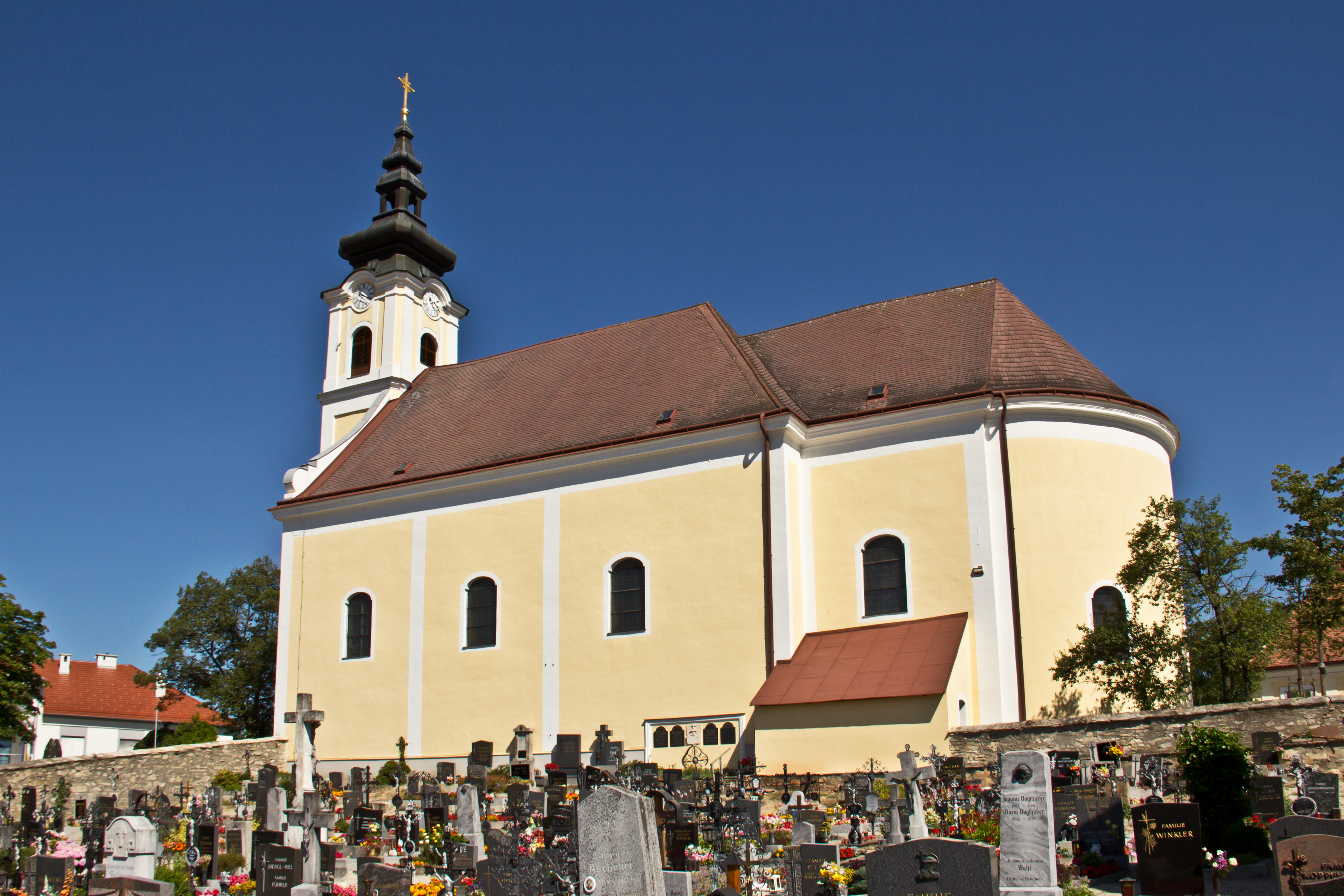 Kath. Pfarrkirche hl. Leonhard in St Leonhard am Hornerwalde und Friedhof